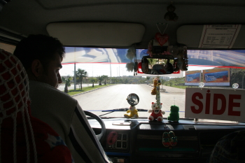 Dolmus mit Fahrer auf dem Weg nach Side